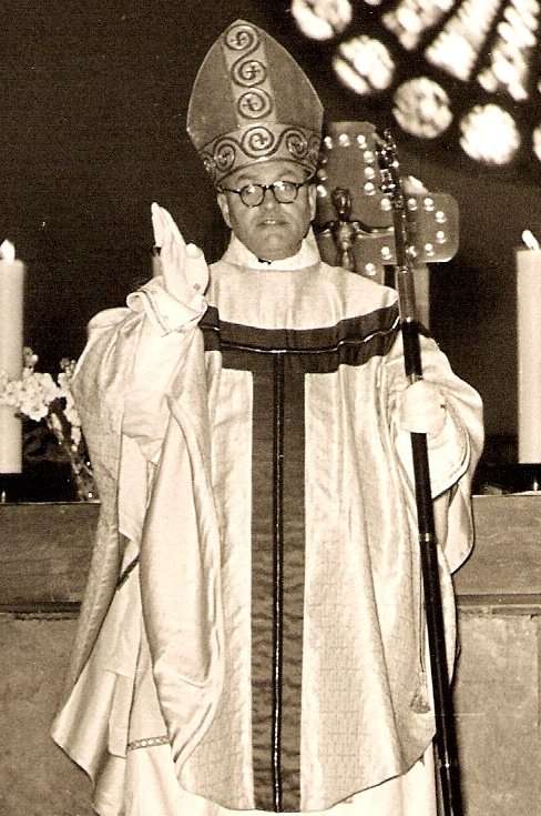 Bonifatius Becker bei der Abtweihe